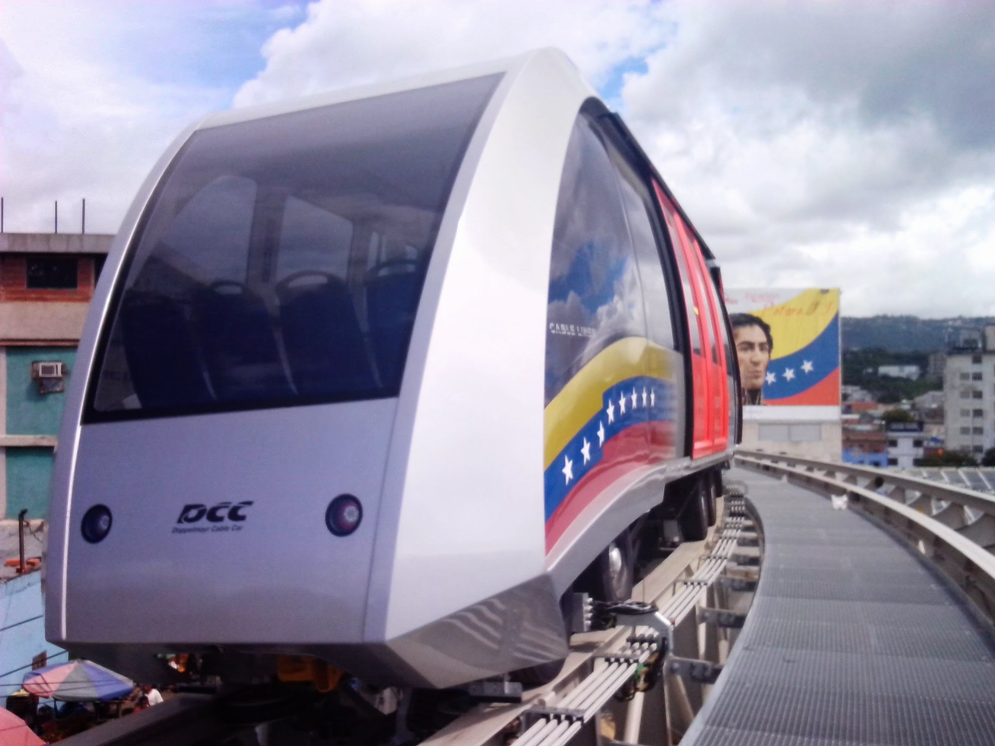 Foto de los trenes del CableTren Bolivariano